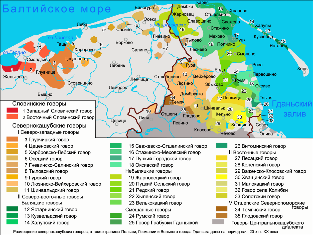 Карта размещения говоров Севернокашубского диалекта в нач. XX века. На основе данных: Friedrich Lorentz. Gramatyka Pomorska, Zeszyt 1. Poznań, 1927 (Pomeranian Digital Library) - карта кашубских говоров и диалектов Фридриха Лоренца на последней странице книги